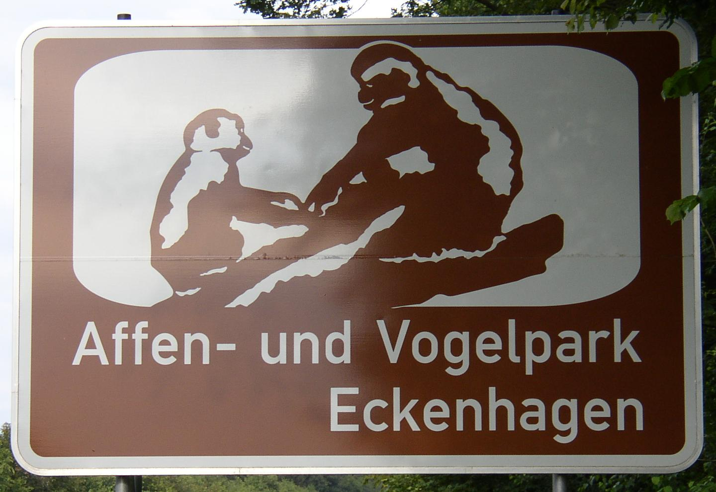 Unterrichtungstafel „Affen- und Vogelpark Eckenhagen“ an der A 4 in Nordrhein-Westfalen, Deutschland